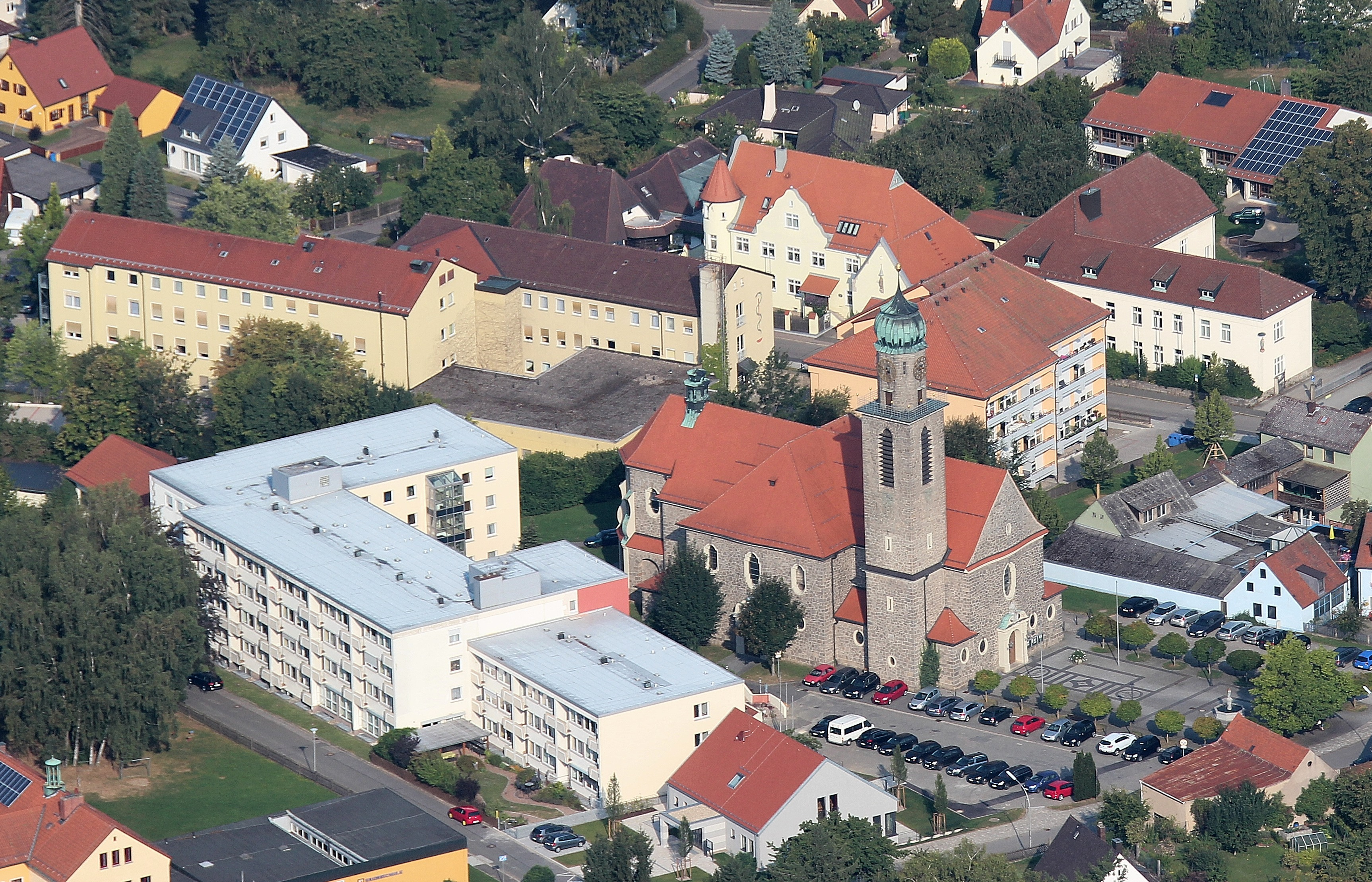 Stadt Vohenstrauß, Landkreis Neustadt an der Waldnaab, Oberpfalz, Bayern: Pfarrkirche Mariä Unbefleckte Empfängnis